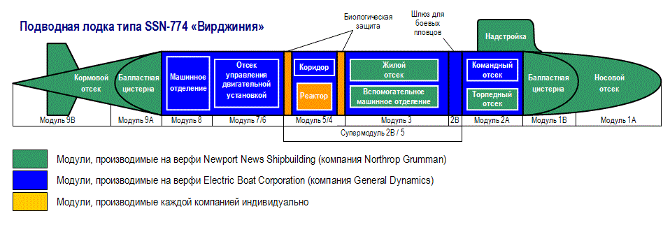 Схема подводной лодки типа «Вирджиния»